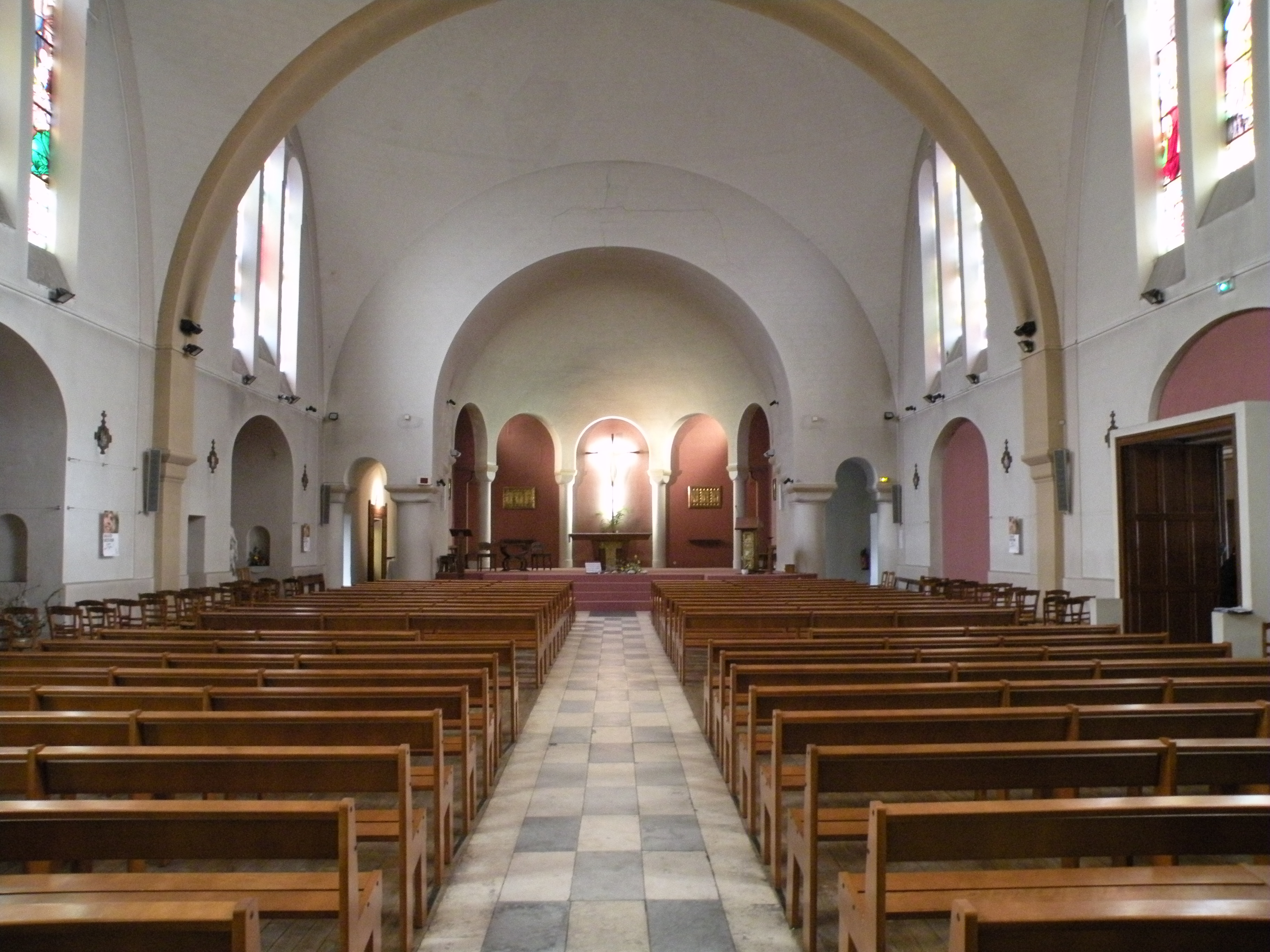 Église Saint-Maurice de Bécon à Courbevoie : la nef.